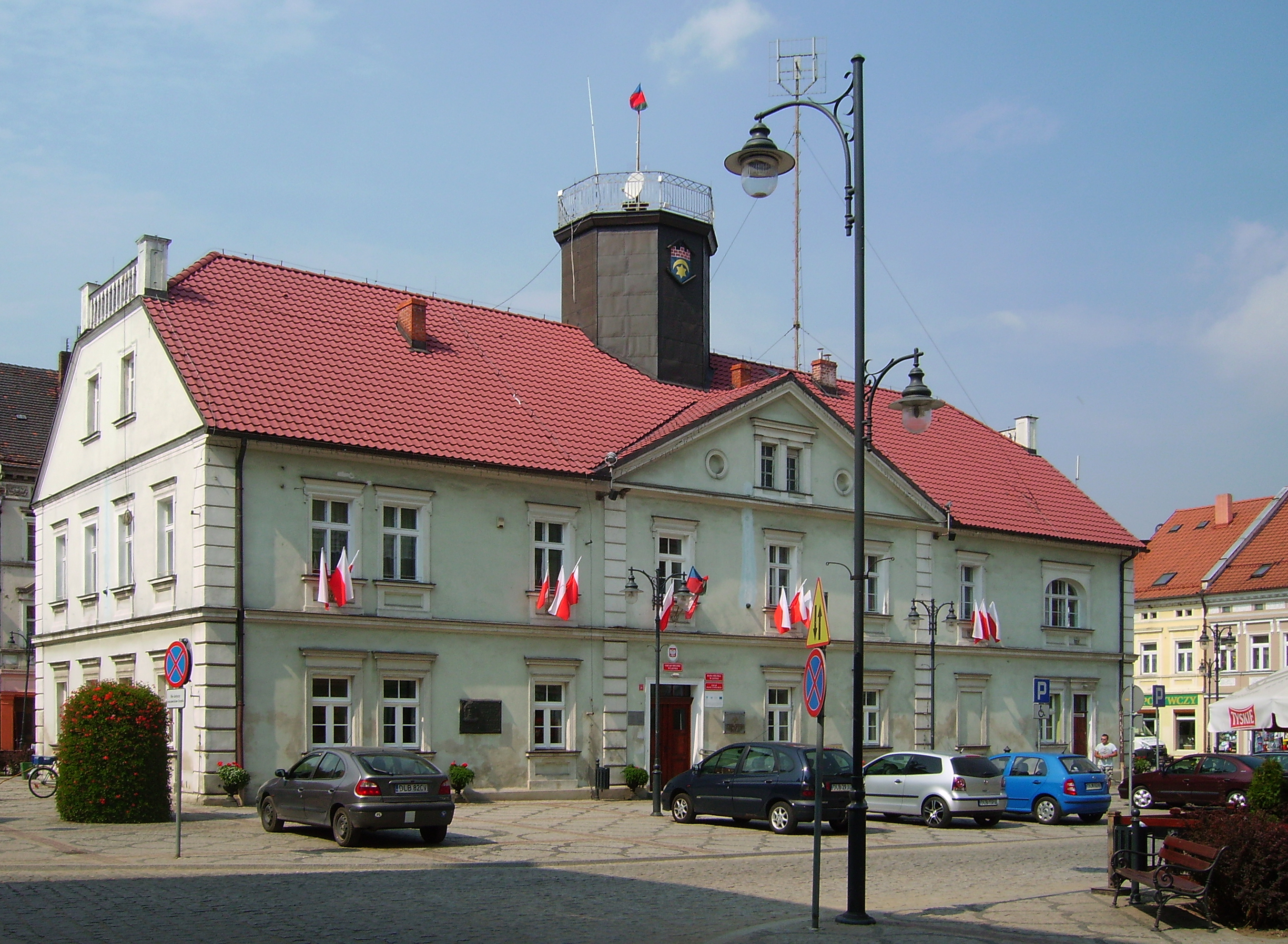 Leśna, ratusz, XVII, XIX